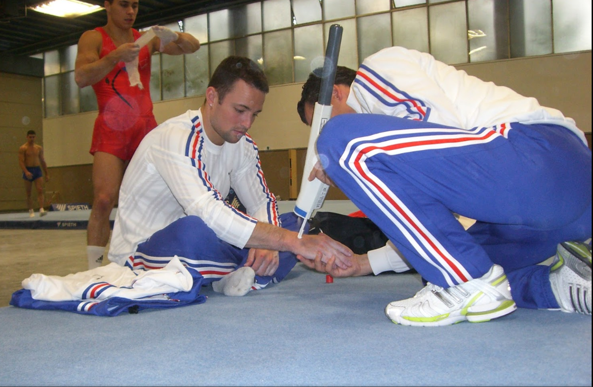 Utilisation de la cryothérpaie hyperbare gazeuse sur le terrain